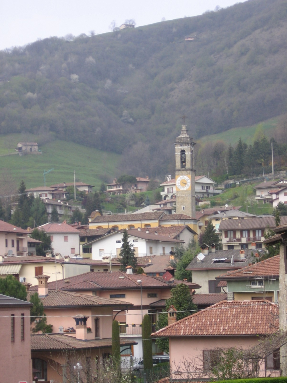 Cazzano Sant’Andrea, Bergamo, Italia